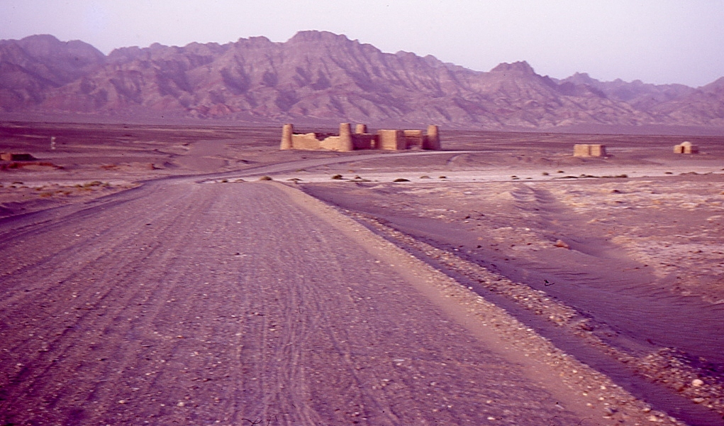 La piste en tôle ondulée entre Mirjaveh et Taftan à la frontière irano-pakistanaise en 1969